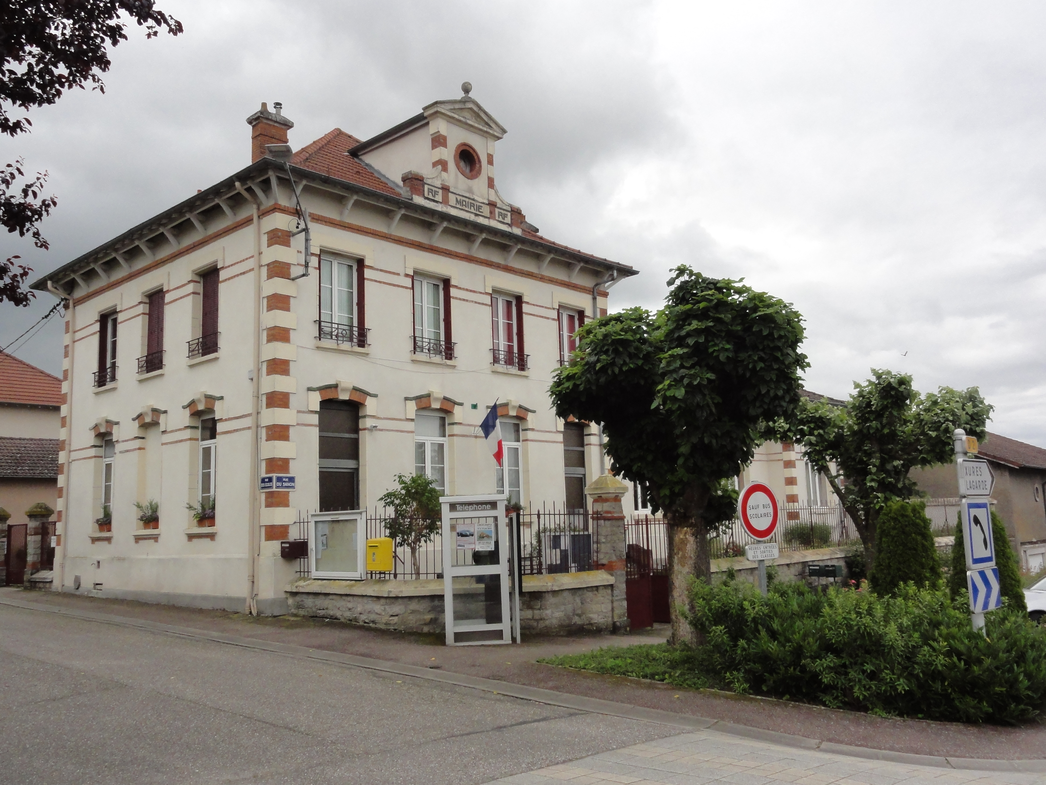 Parroy (M-et-M) mairie